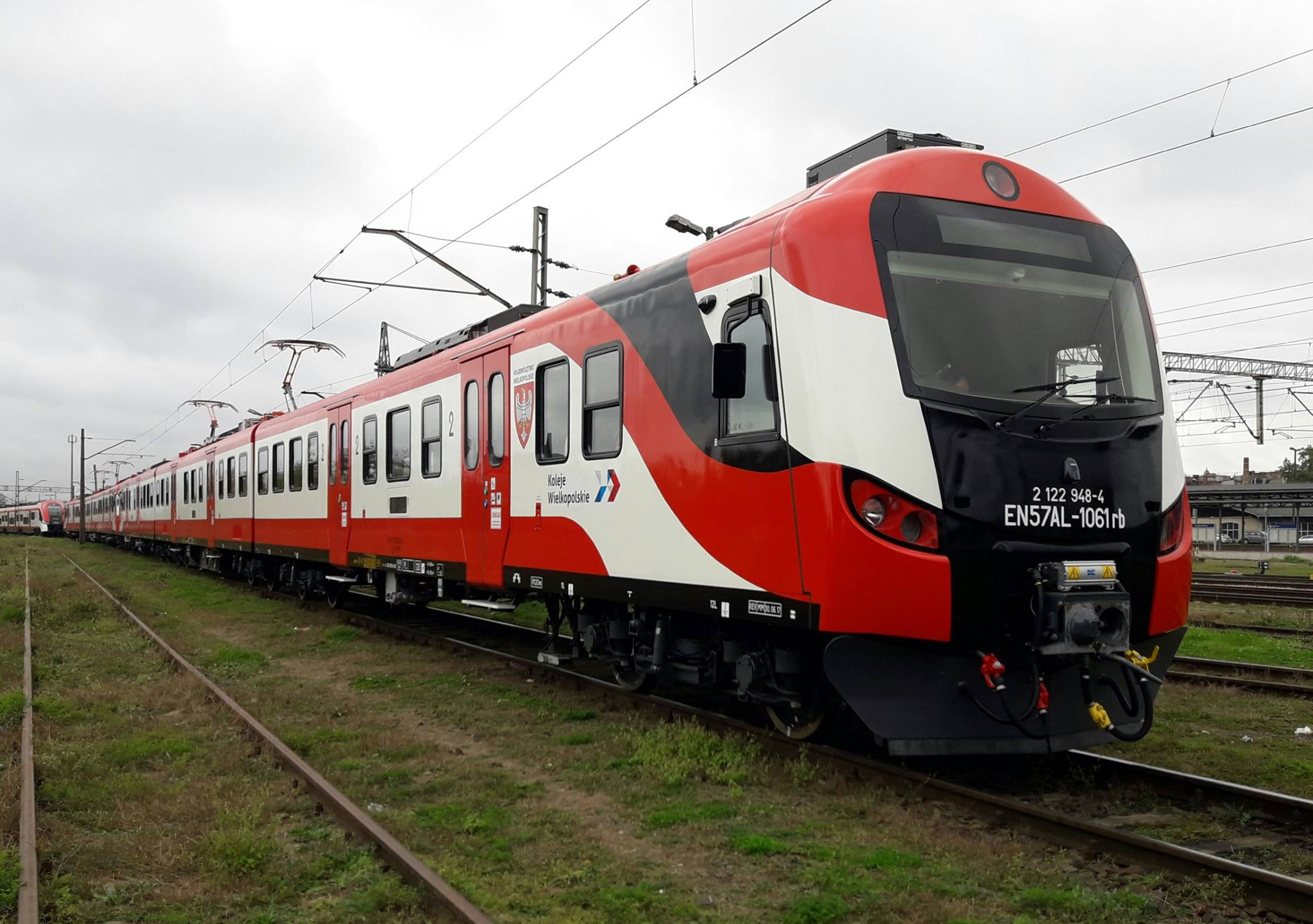 Zmodernizowany elektryczny zespół trakcyjny EN57AL-1061, eksploatowany przez Koleje Wielkopolskie, stoi na terenie stacji Poznań Główny.